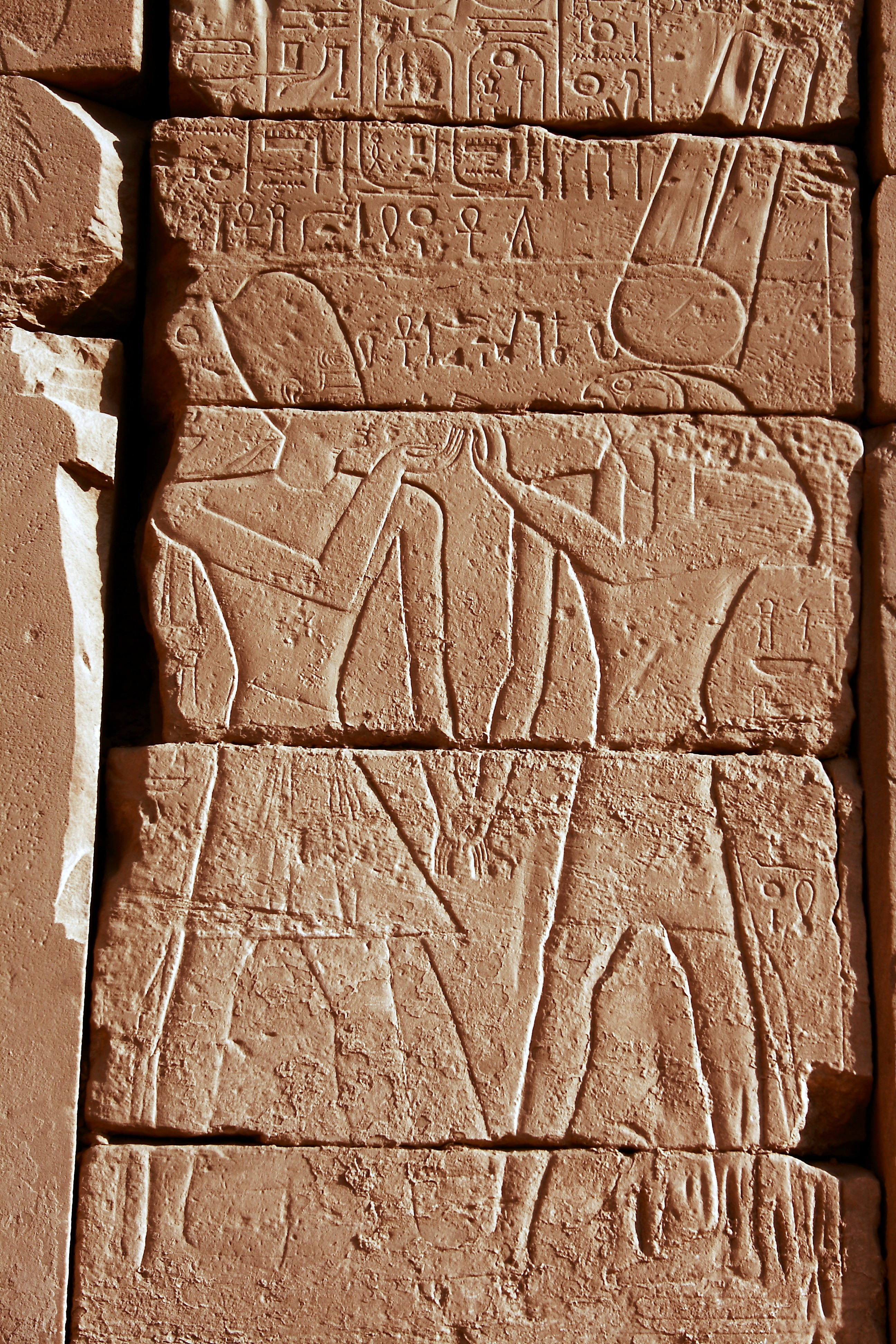 Karnak_temple